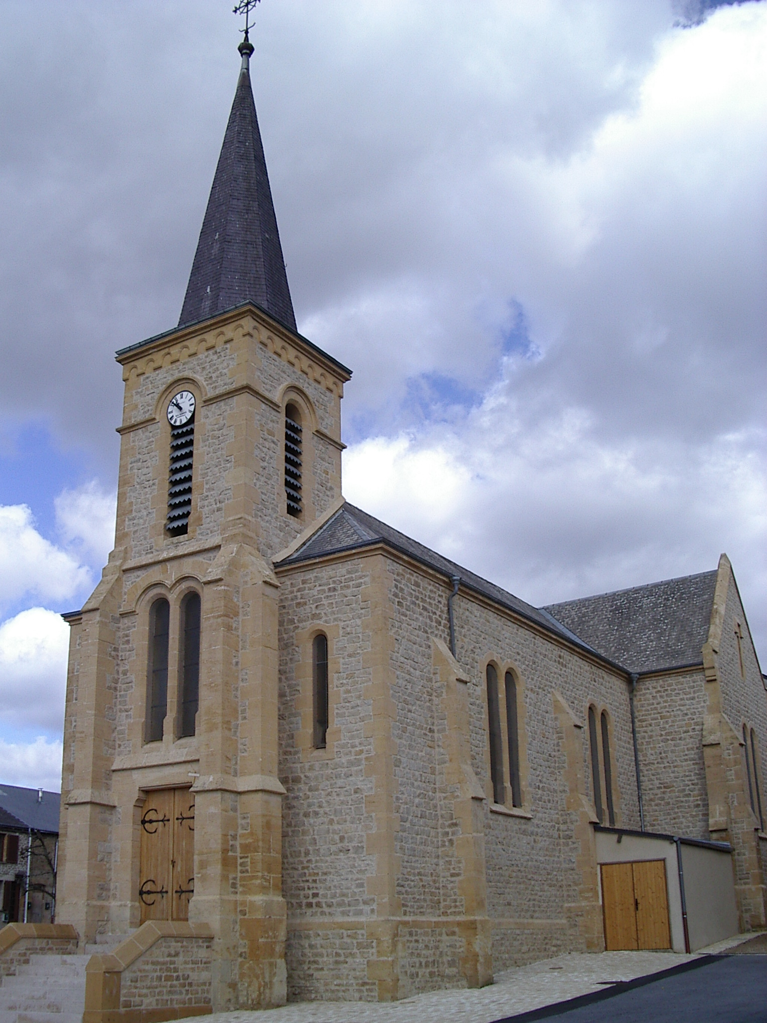 Eglise Saint Charles Borromée Bosseval et Briancourt Ardennes France